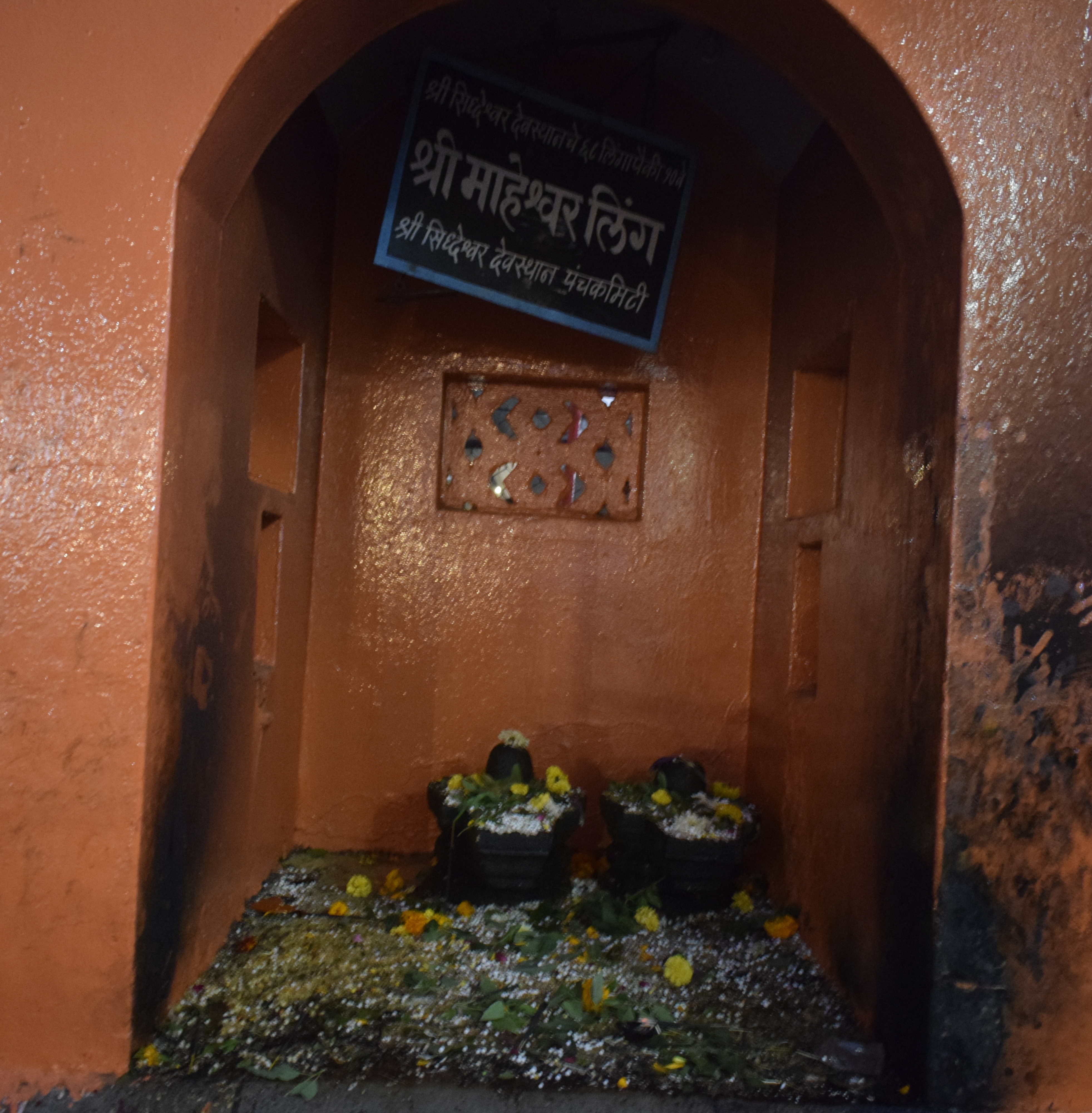 श्री माहेश्वर लिंग